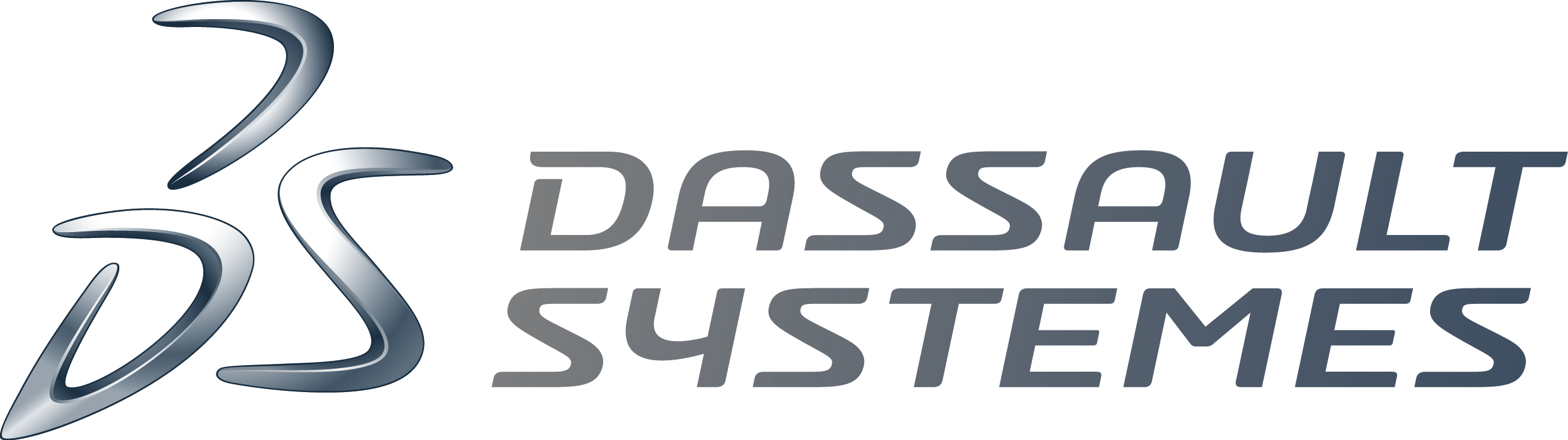 Logo DS